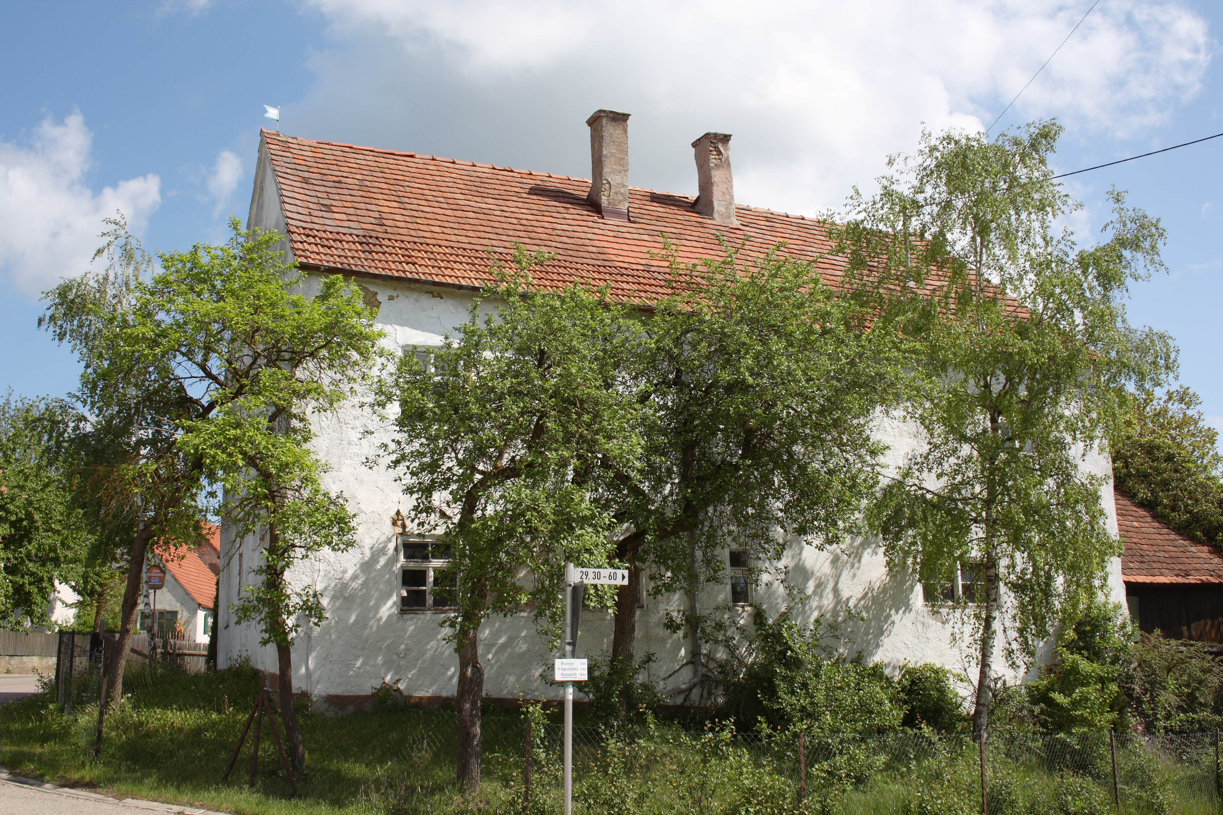 ehemaliges Gasthaus in Oberliezheim, Haus Oberliezheim 27, im Kern 18. Jahrhundert